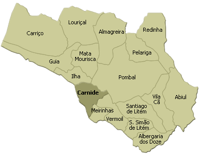 localisation de carnide dans la freguesia de pombal